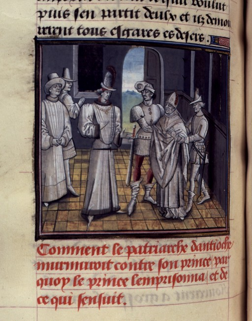 Arrestation d'Aimeric Malafaida